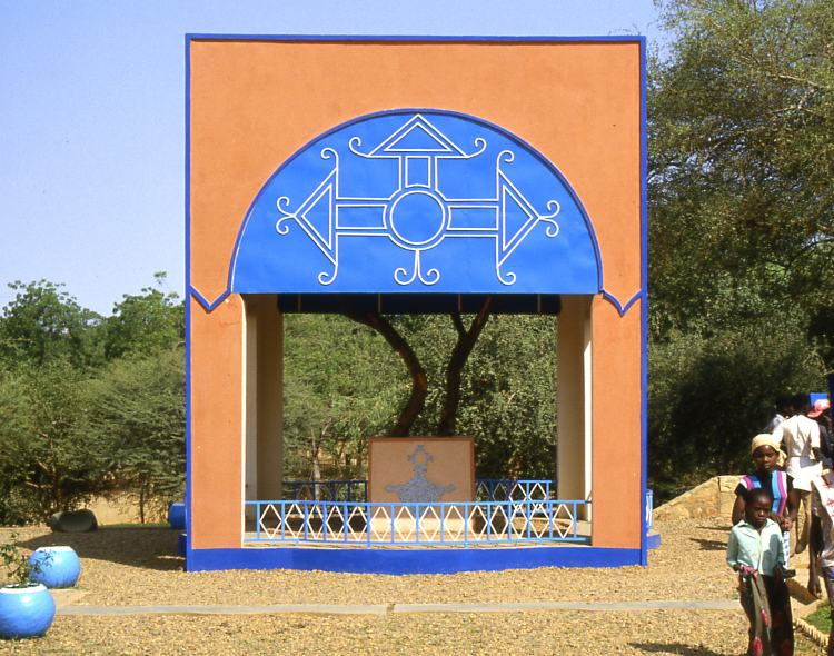 Der durch einen LKW umgefahrene Arbre du Ténéré steht jetzt in einem Pavillon im Nationalmuseum in Niamey, der Hauptstadt des Niger.